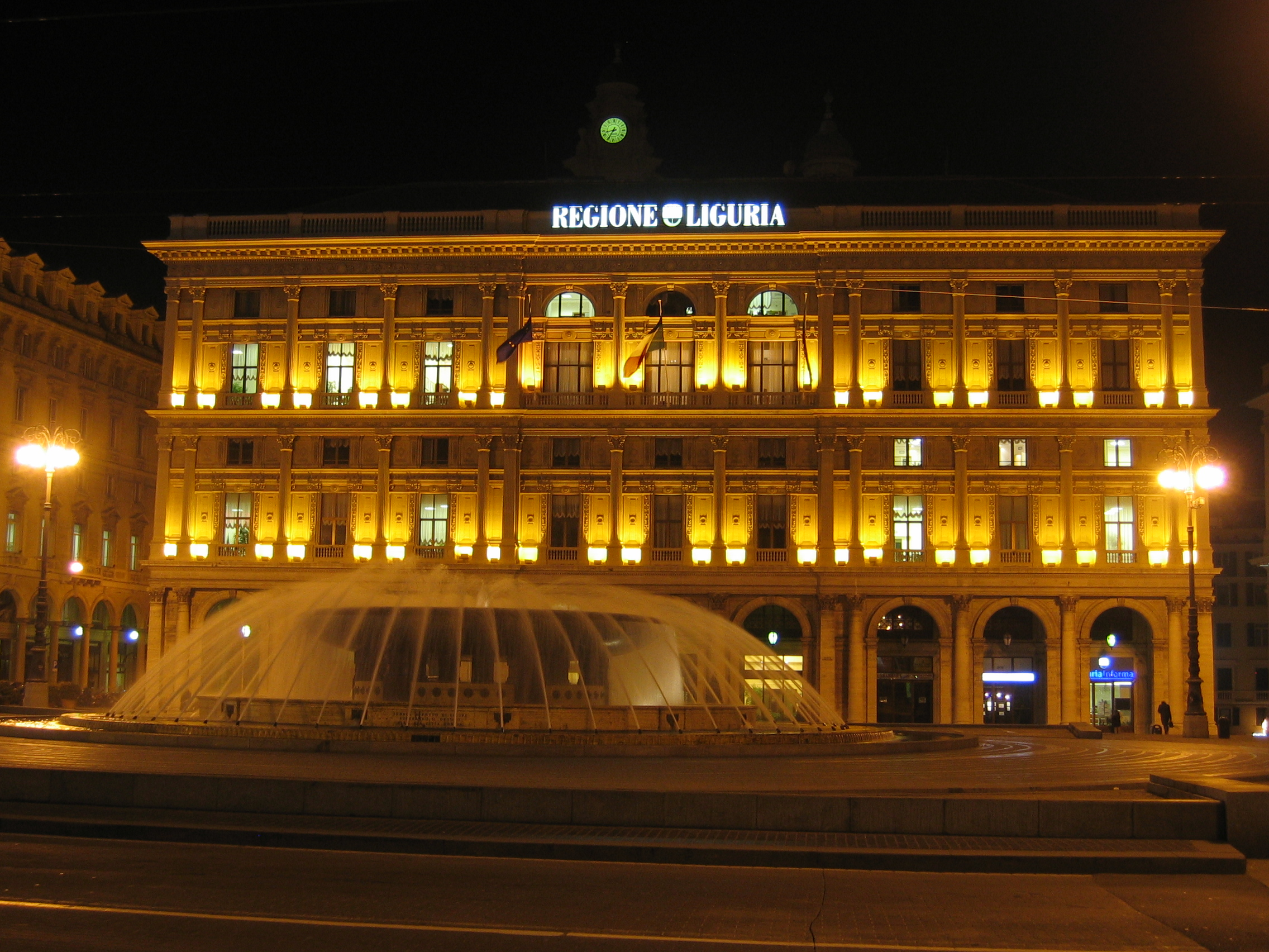 Una suggestiva immagine notturna della sede della Regione Liguria a Genova, Italia